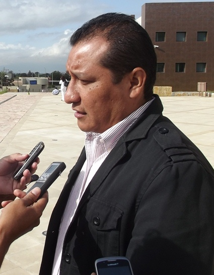 César Mateos, ex vocero de la APPO, al interponer denuncia penal contra el ex gobernador de Oaxaca Ulises Ruiz